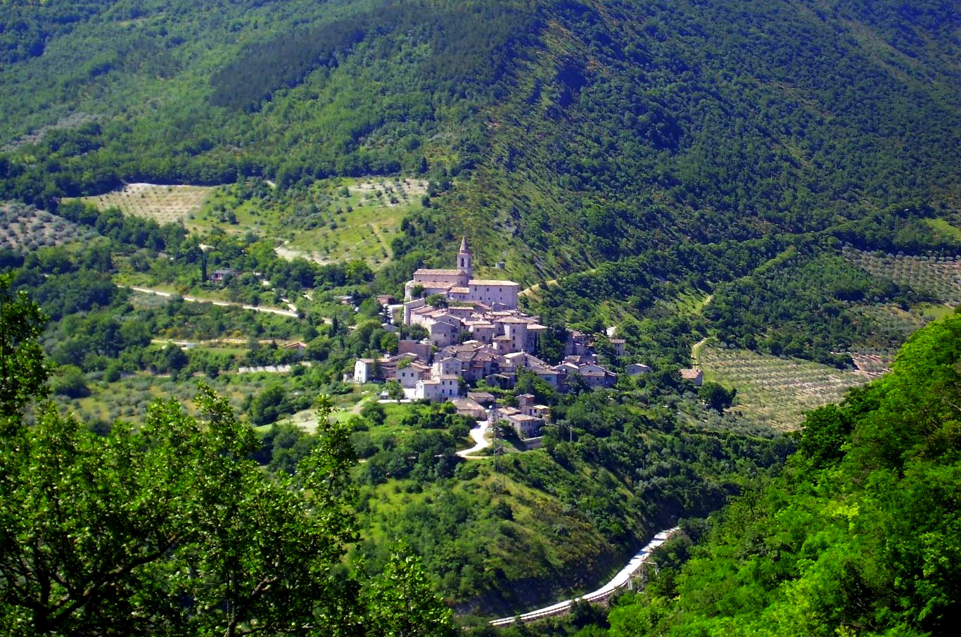 Castello di Pievefavera